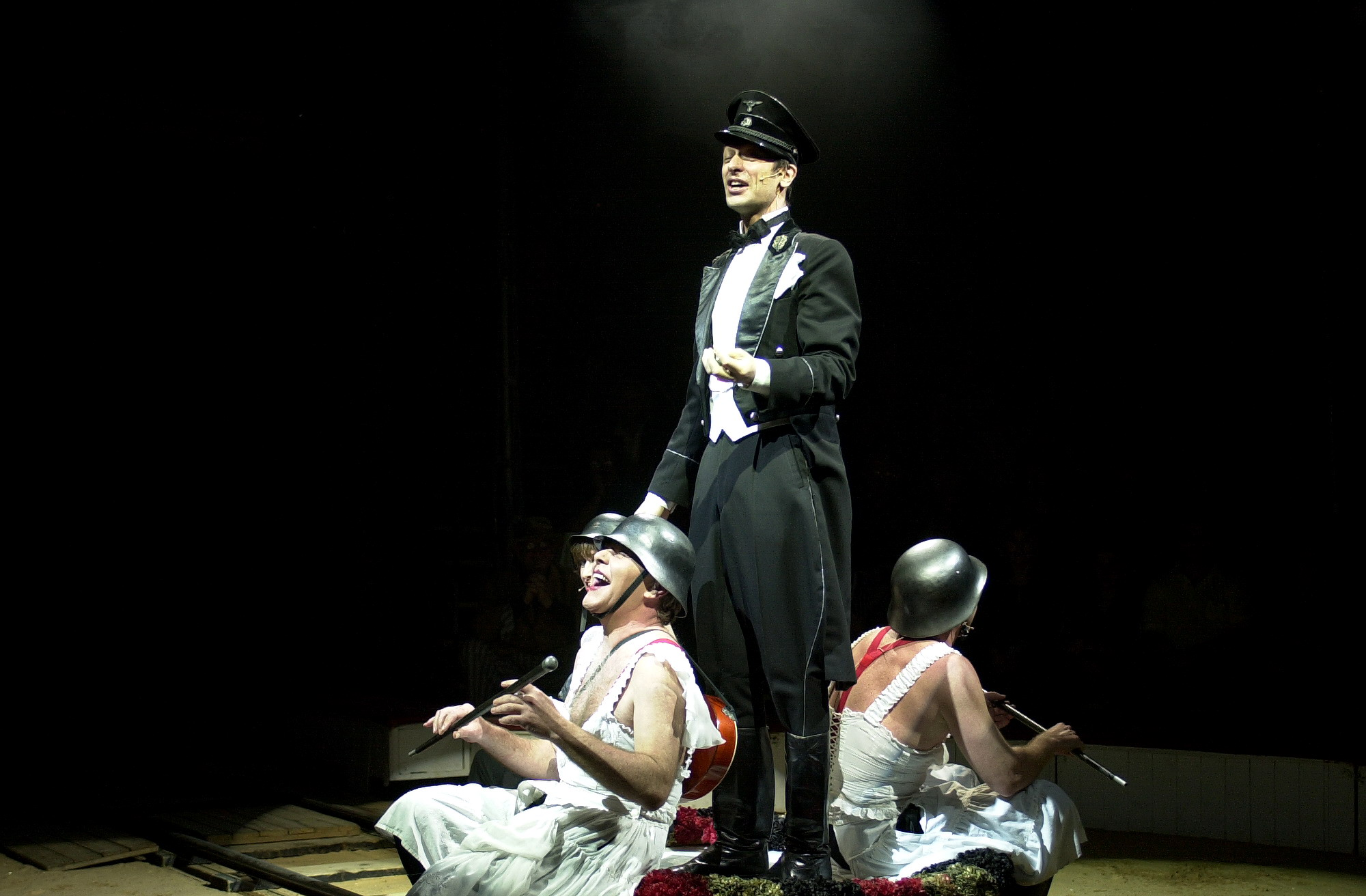 ישראל סשה דמידוב - אדם בן כלב - 1993